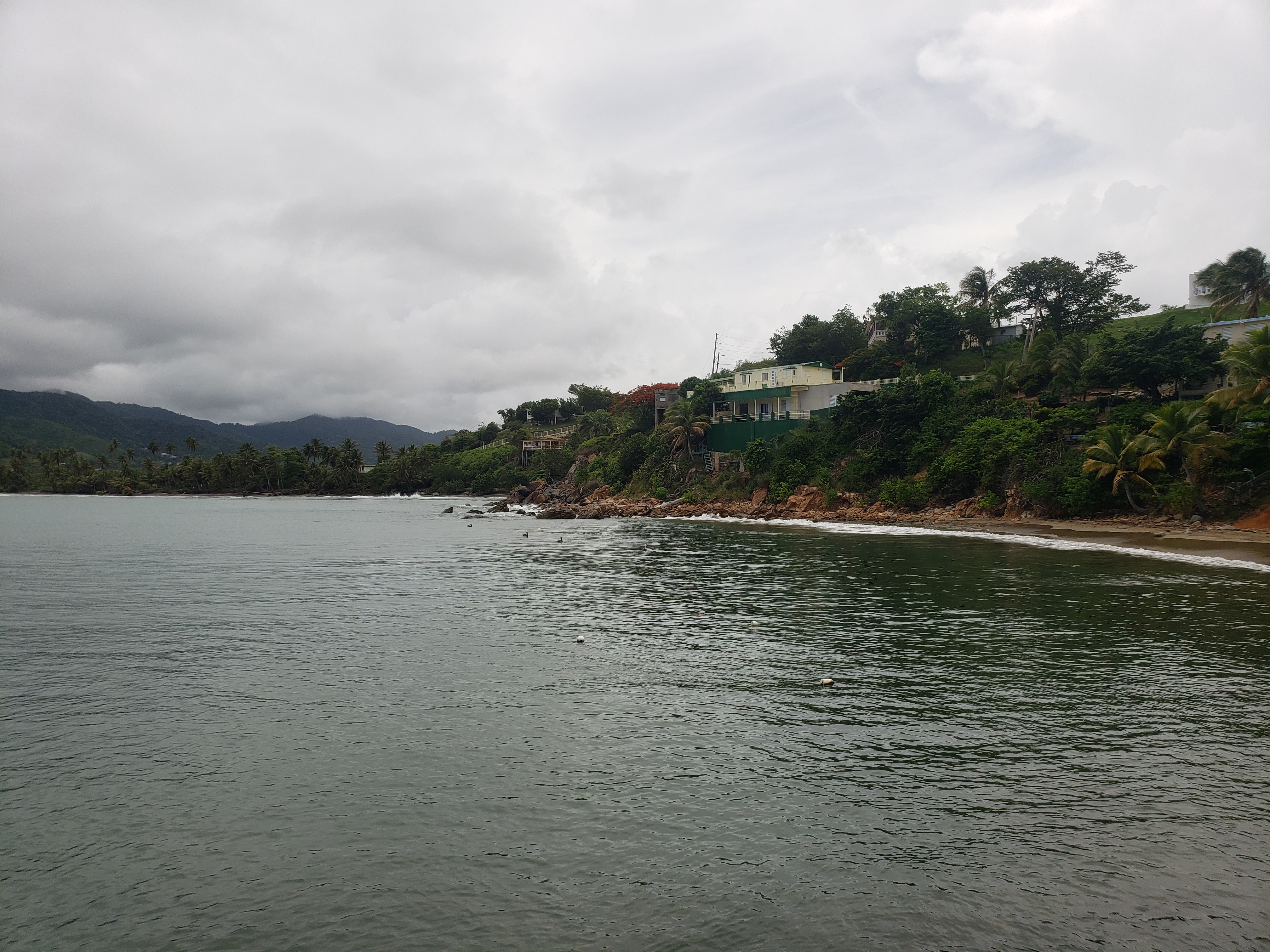 Vista de Villa Pesquera desde el malecón en Maunabo, Puerto Rico